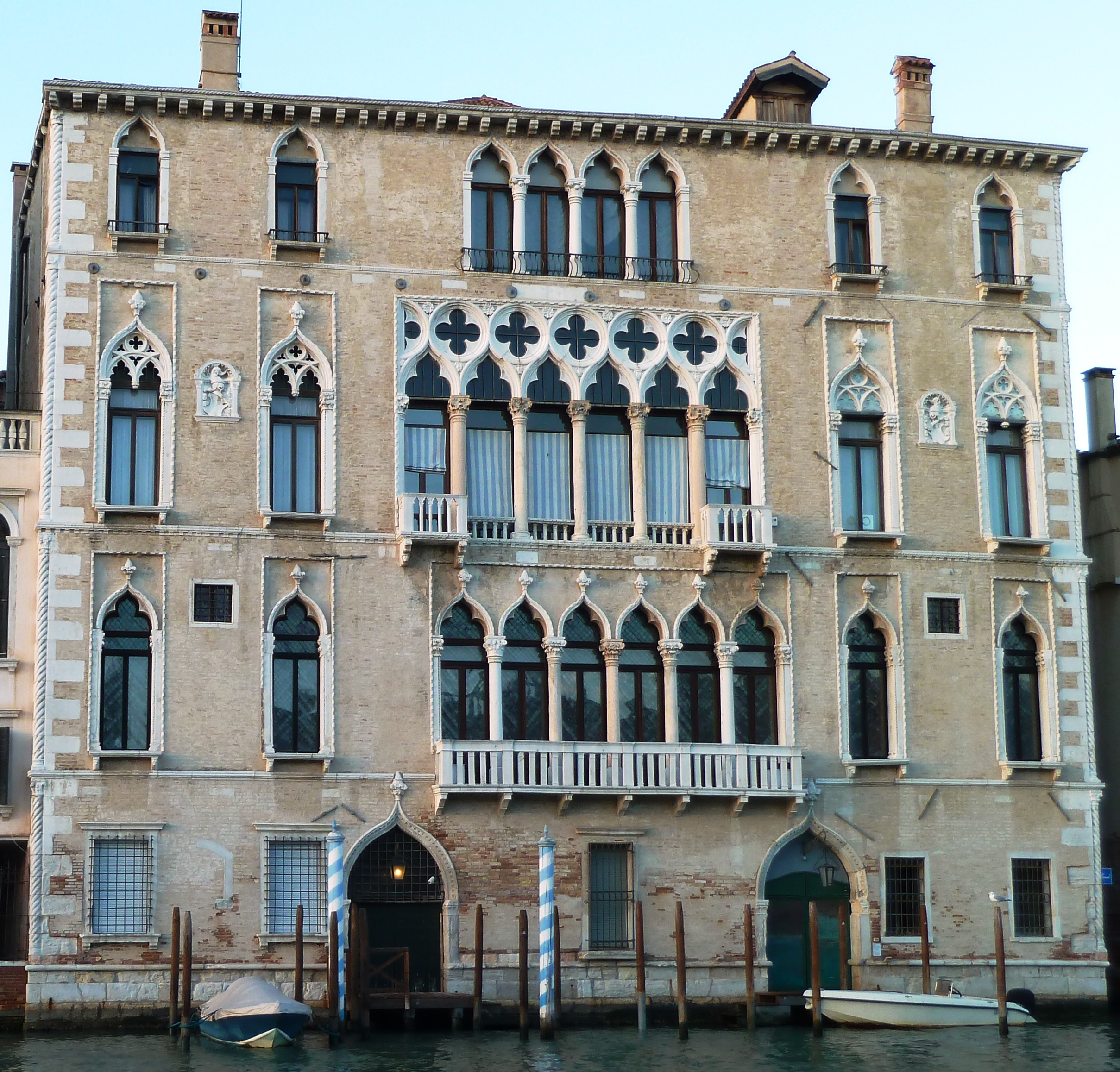 Pal bernardo gran canal